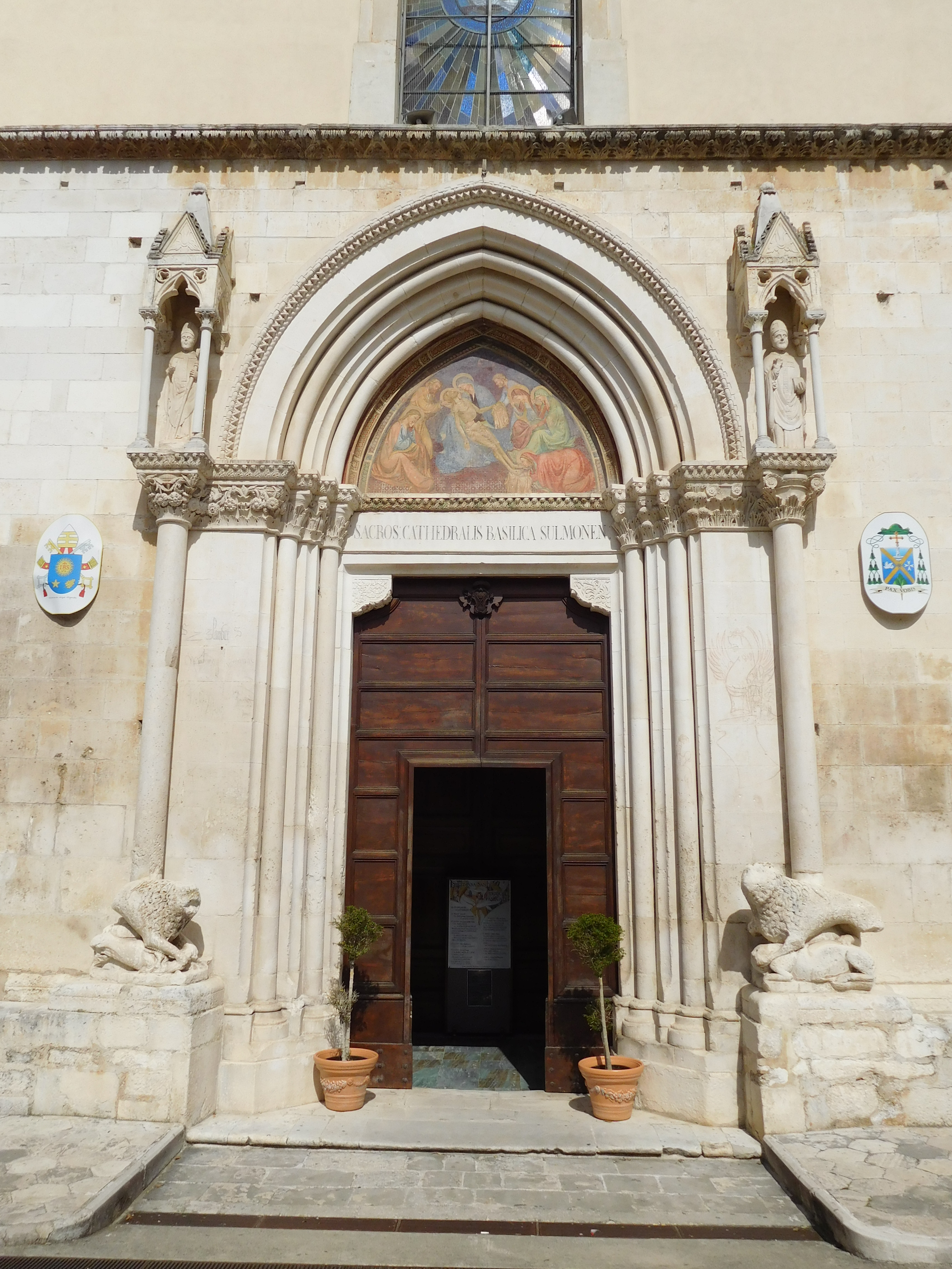 Chiesa di San Panfilo, Sulmona